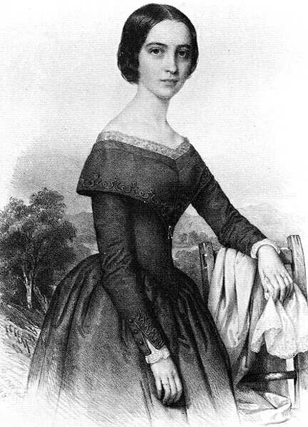 Szendrey Júlia Forrás